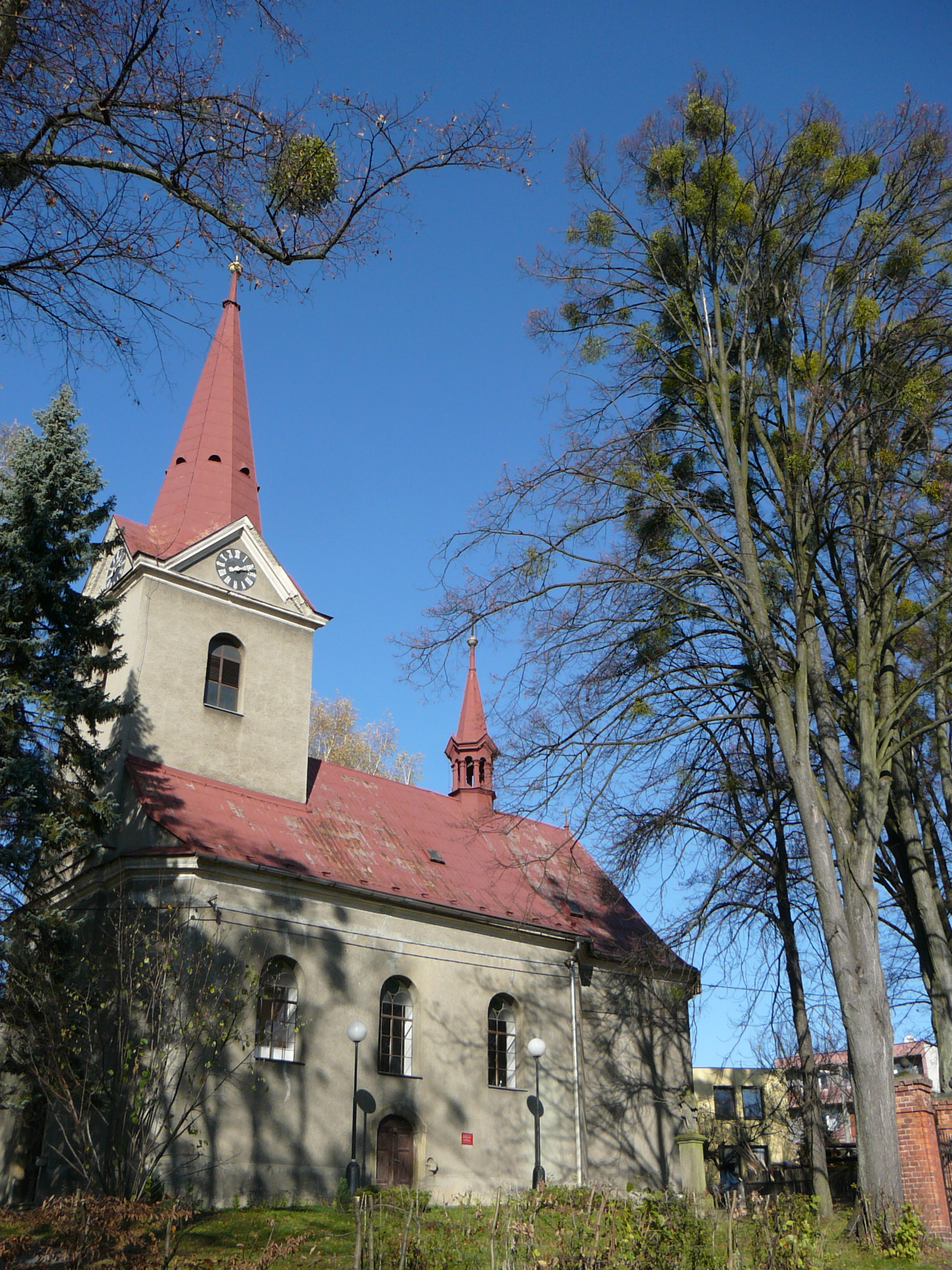 kostel Lískovec